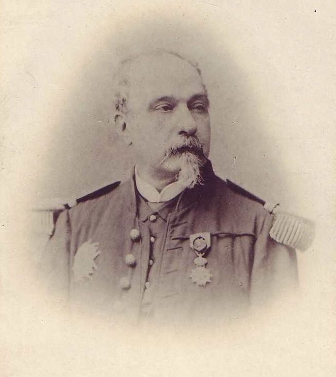 Portrait de Jules Etienne FORGEOT